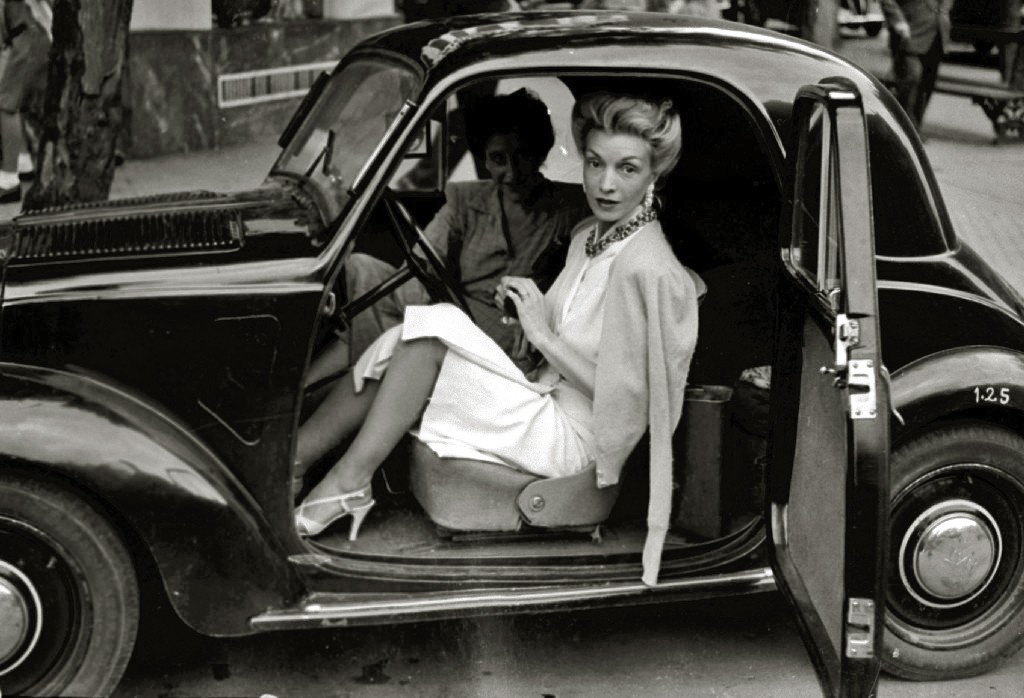 Título original: La actriz Conchita Montenegro en San Sebastián (5/7) Localización: San Sebastián (Guipúzcoa)